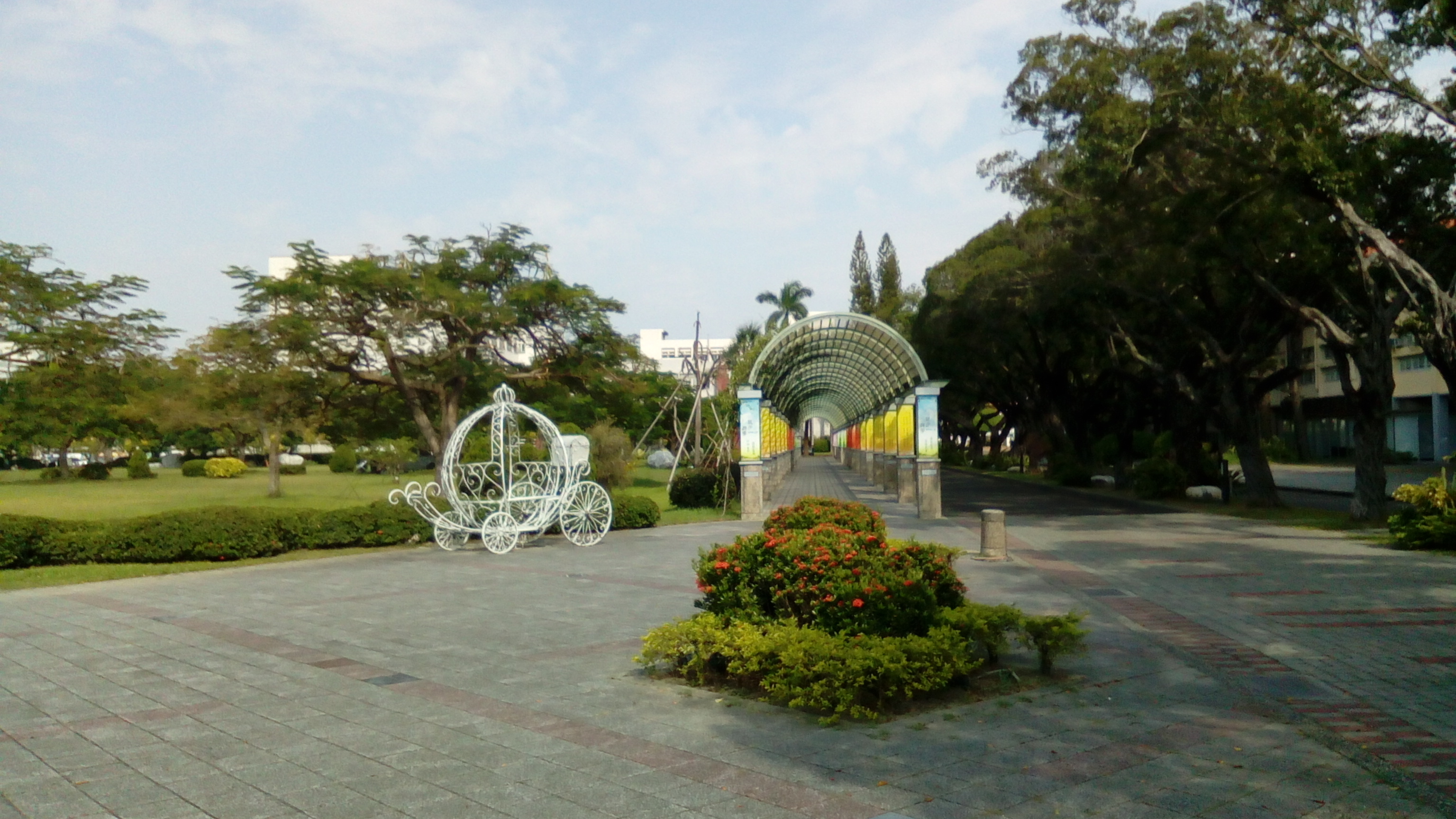 同上